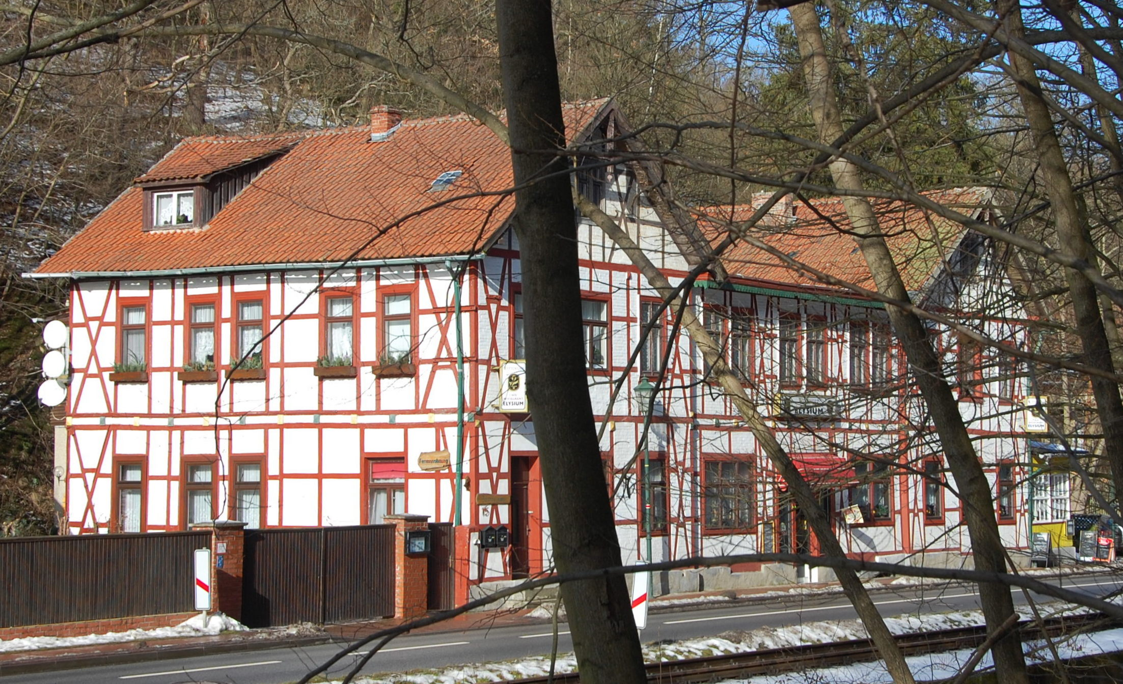 Haus Kreisstraße 15 in Alexisbad